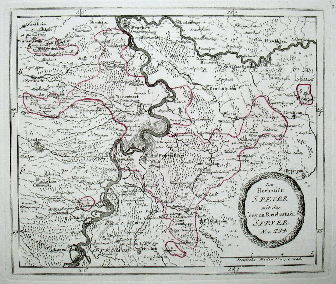 Das Hochstift Speyer mit der Freyen Reichsstadt Speyer. Nro. 234. Kolorierter Kupferstich